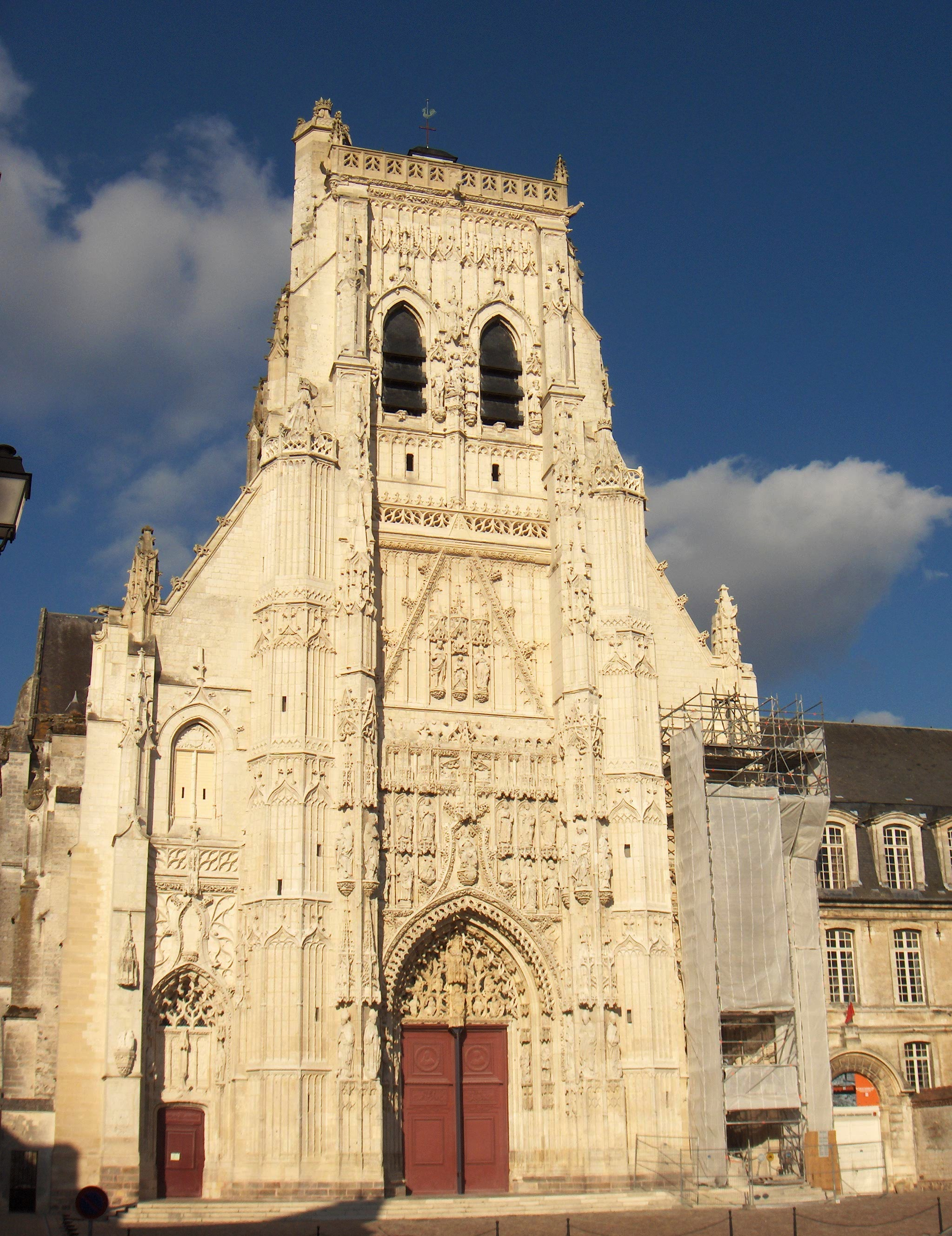 Saint-Riquier (Frankreich, Dept. Somme), ehemalige Abteikirche, spätgotisch (13. - 16. Jh.); heute Pfarrkirche.